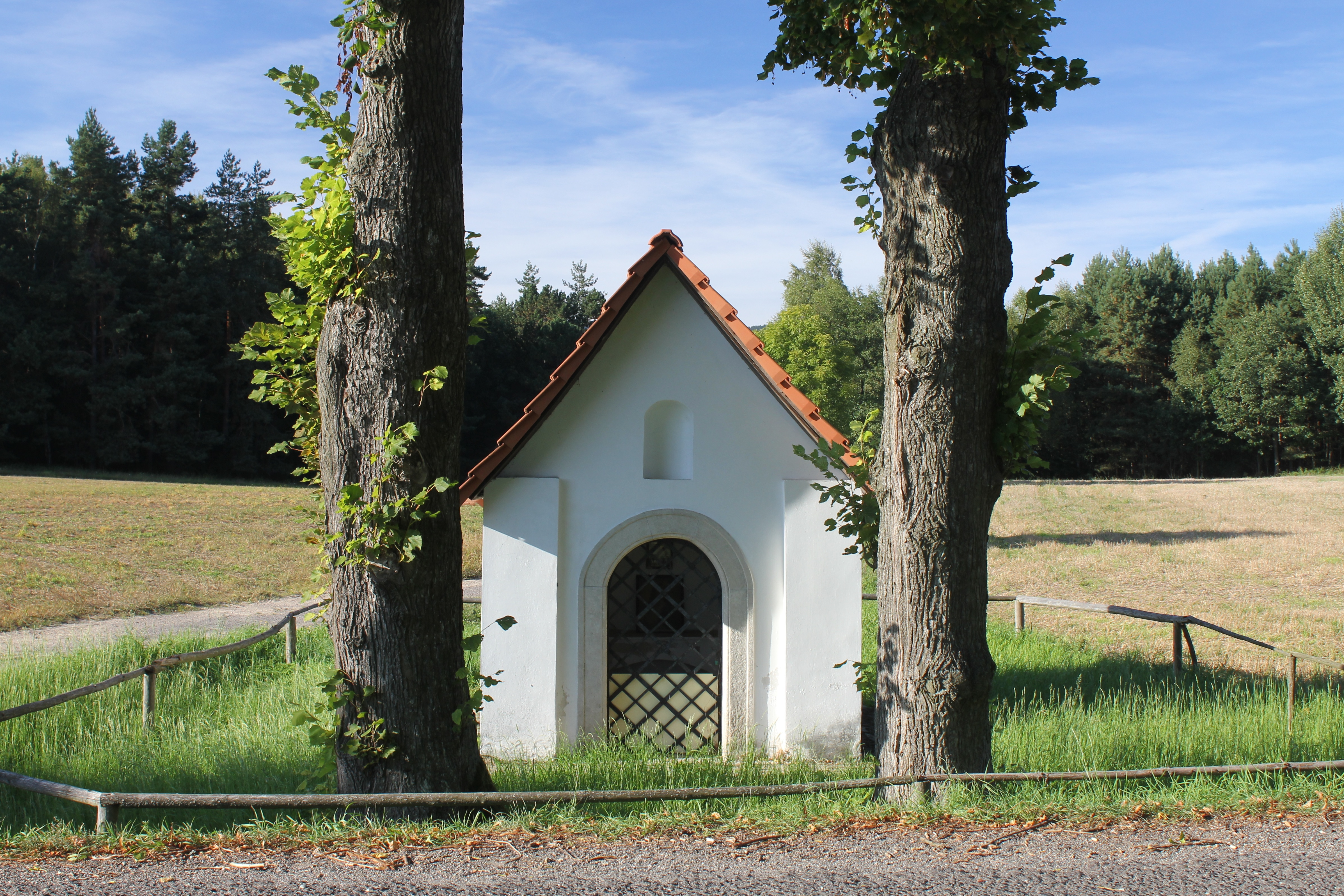 Barokní kaplička zasvěcená P. Marii (1773), Bílá